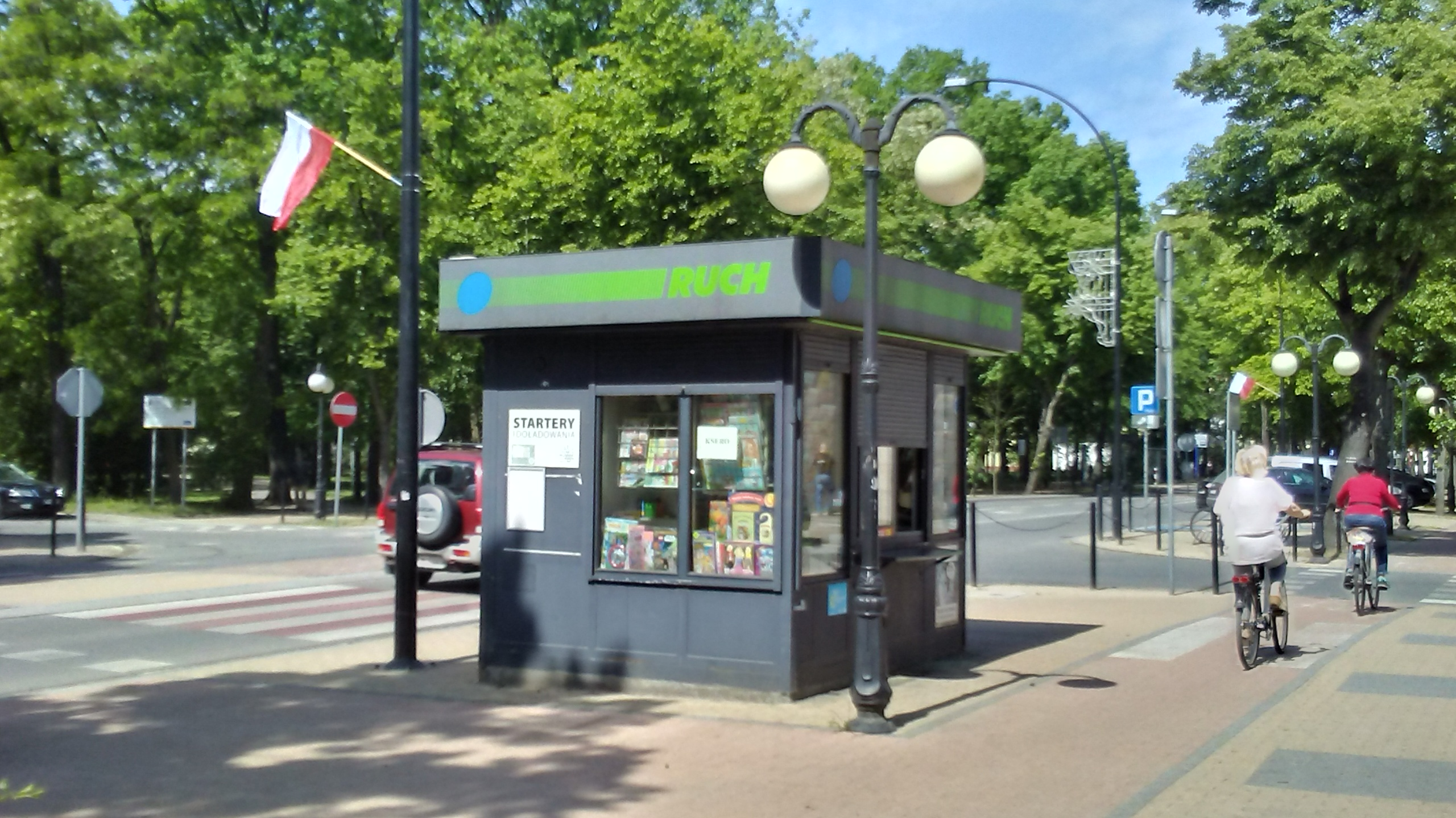 Kiosk Ruchu w sześćdziesięcio tysiecznym Tomaszowie Mazowieckim w województwie łódzkim